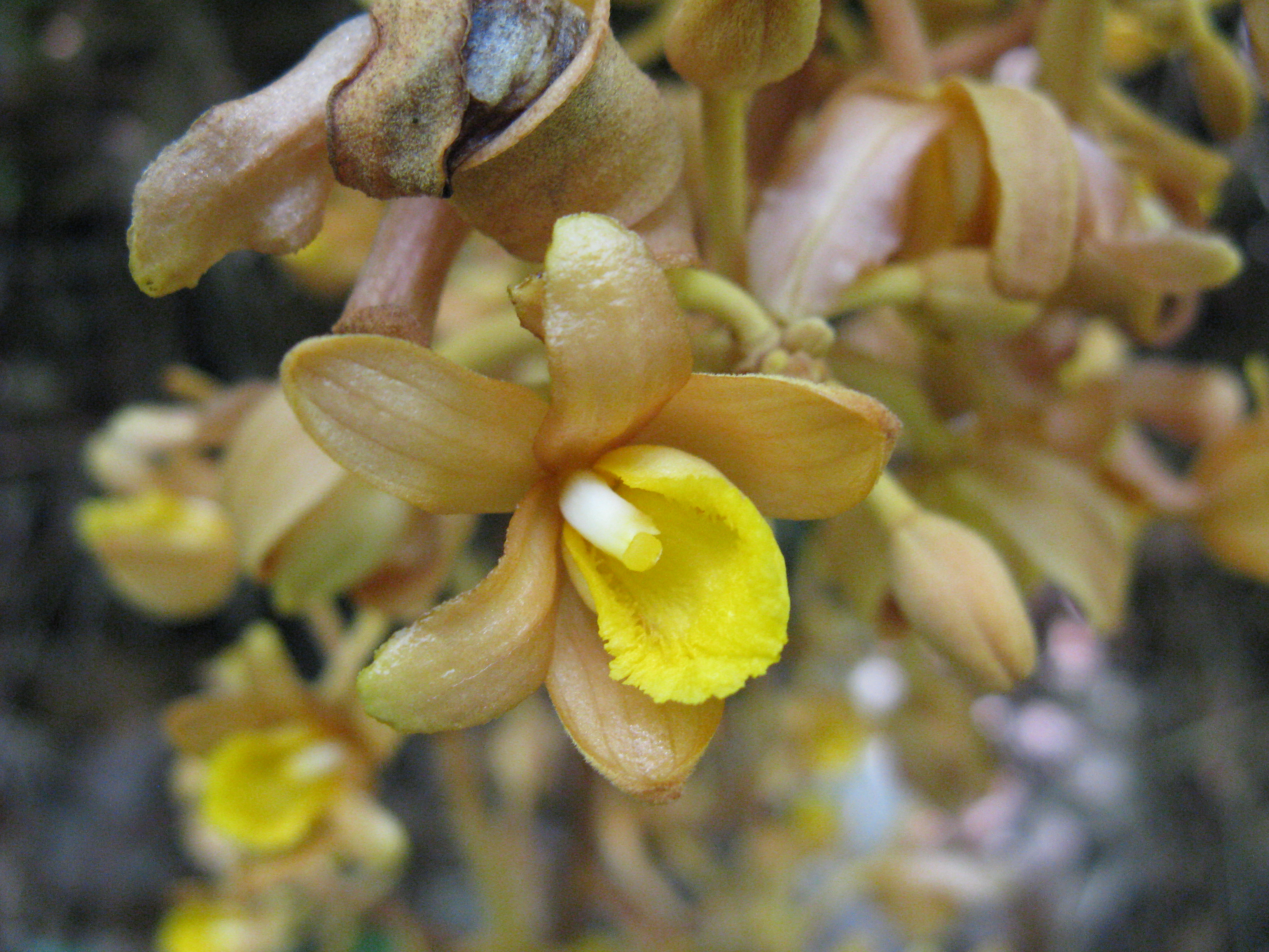 Scientific name Galeola septentrionalis